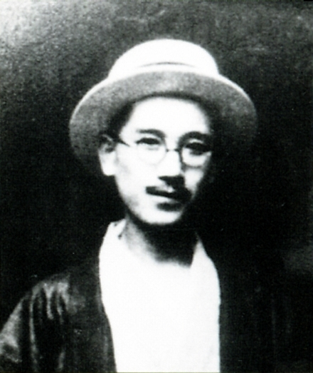 a Japanese man, Kasai Zenzo